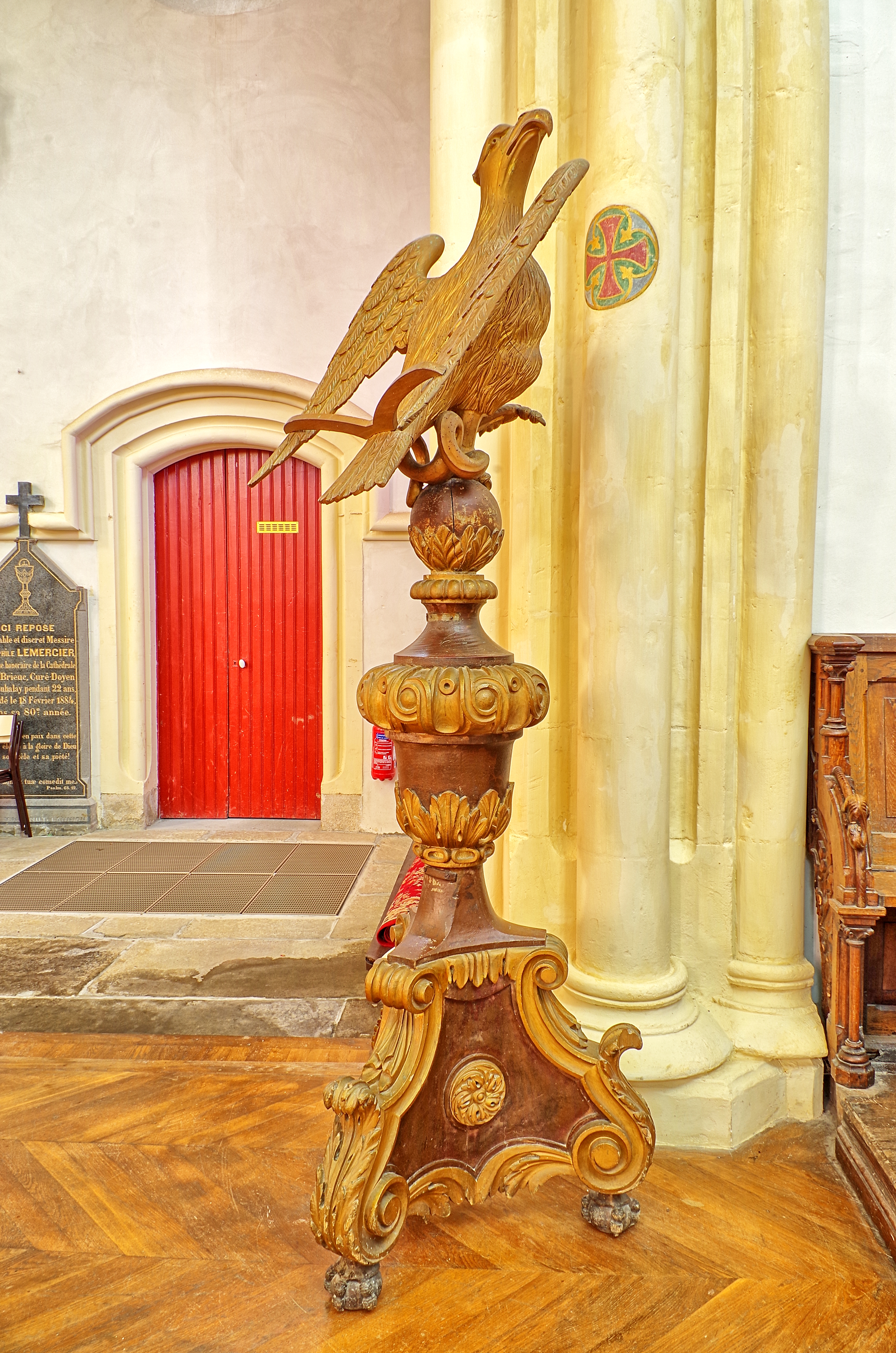 Lutrin (aigle-lutrin) en bois peint et doré du XVIIIe siècle.